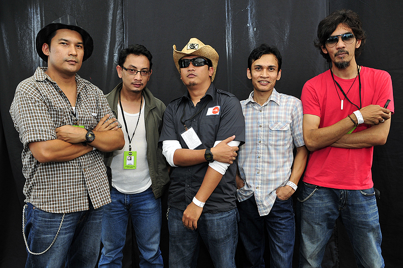 Dead Mushroom di pentas konsert Sunburst KL09